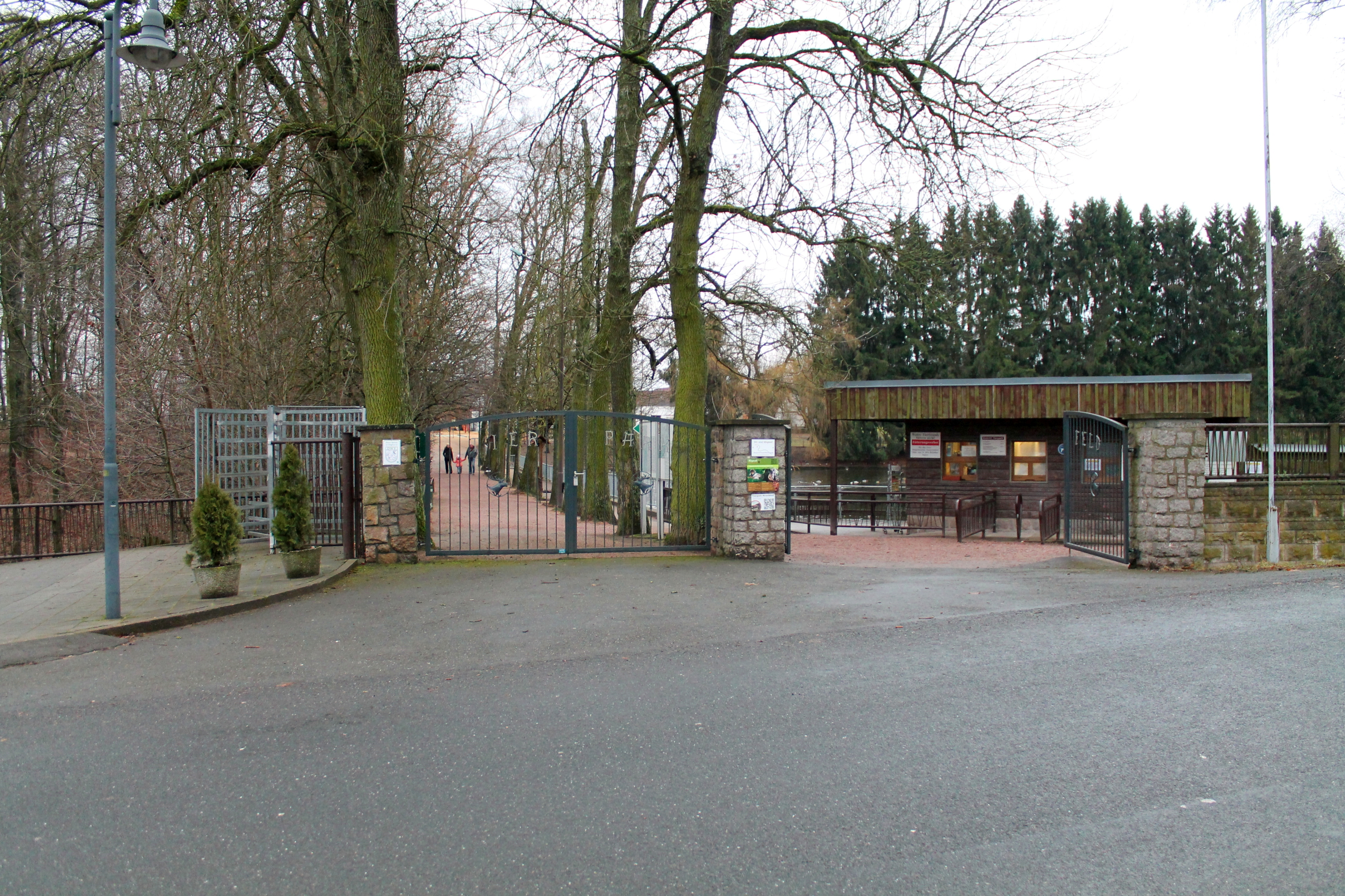 Hirschfelder Tierpark, Eingang.